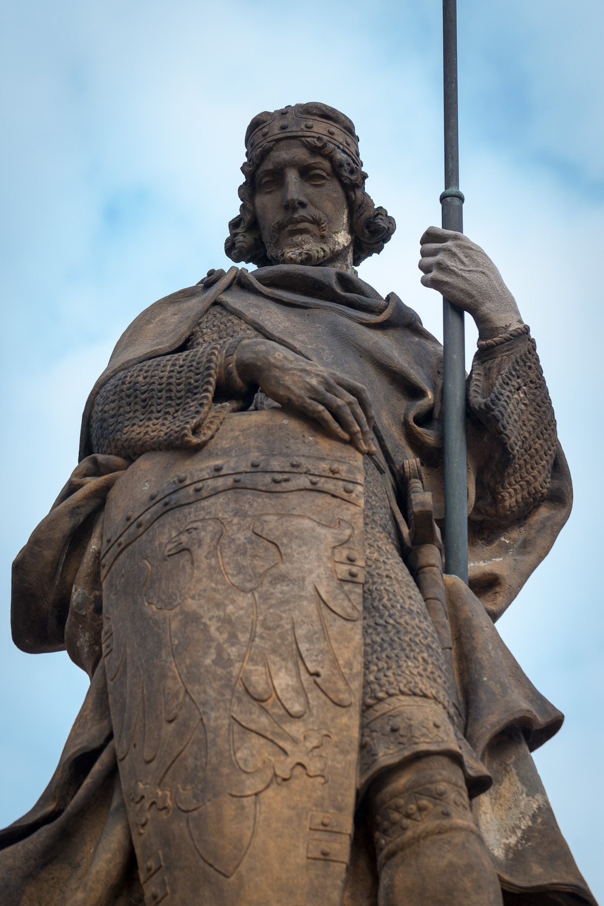 Prague